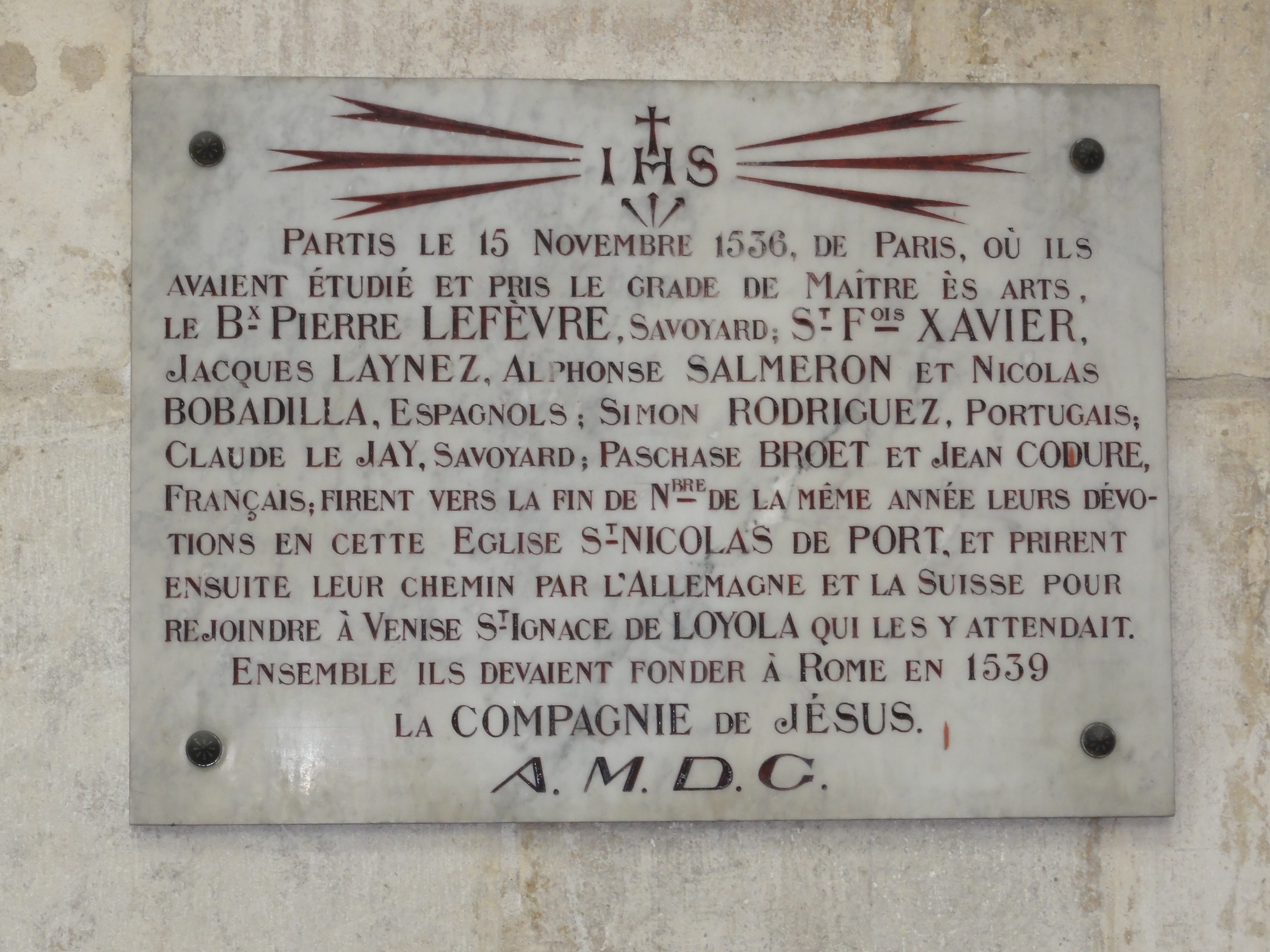 Église Saint-Nicolas-de-Port, plaquette passage 9 premiers futurs jésuites, nov. 1536.